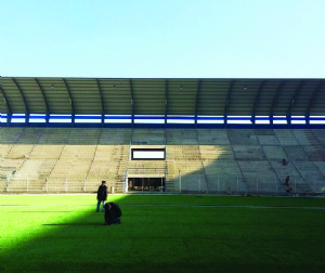 Tribunas del Estadio Municipal El Alto